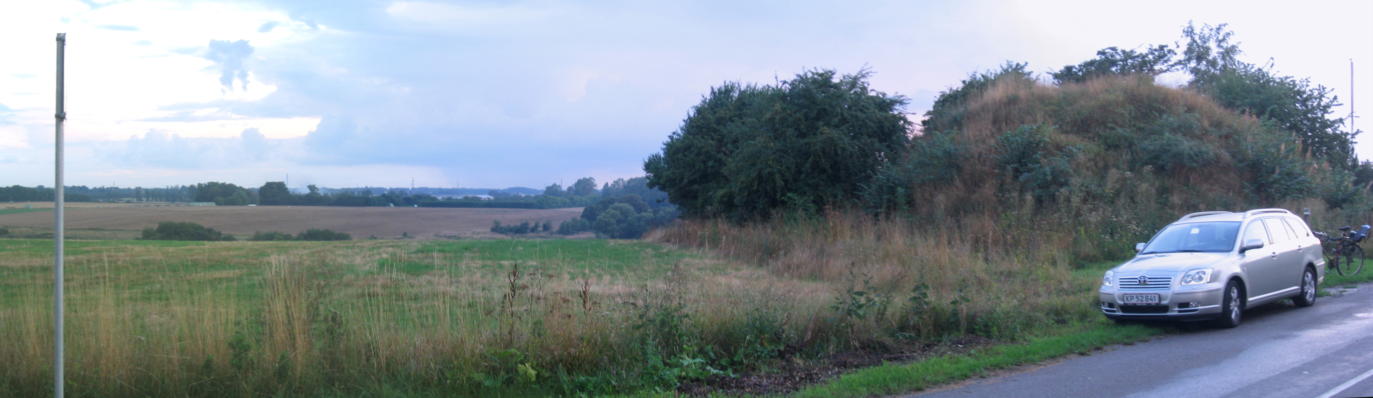 Ole Rømers Høj, Vridsløsemagle, Denmark